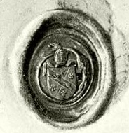 Szatmári György esztergomi érsek gyűrűs pecsétje